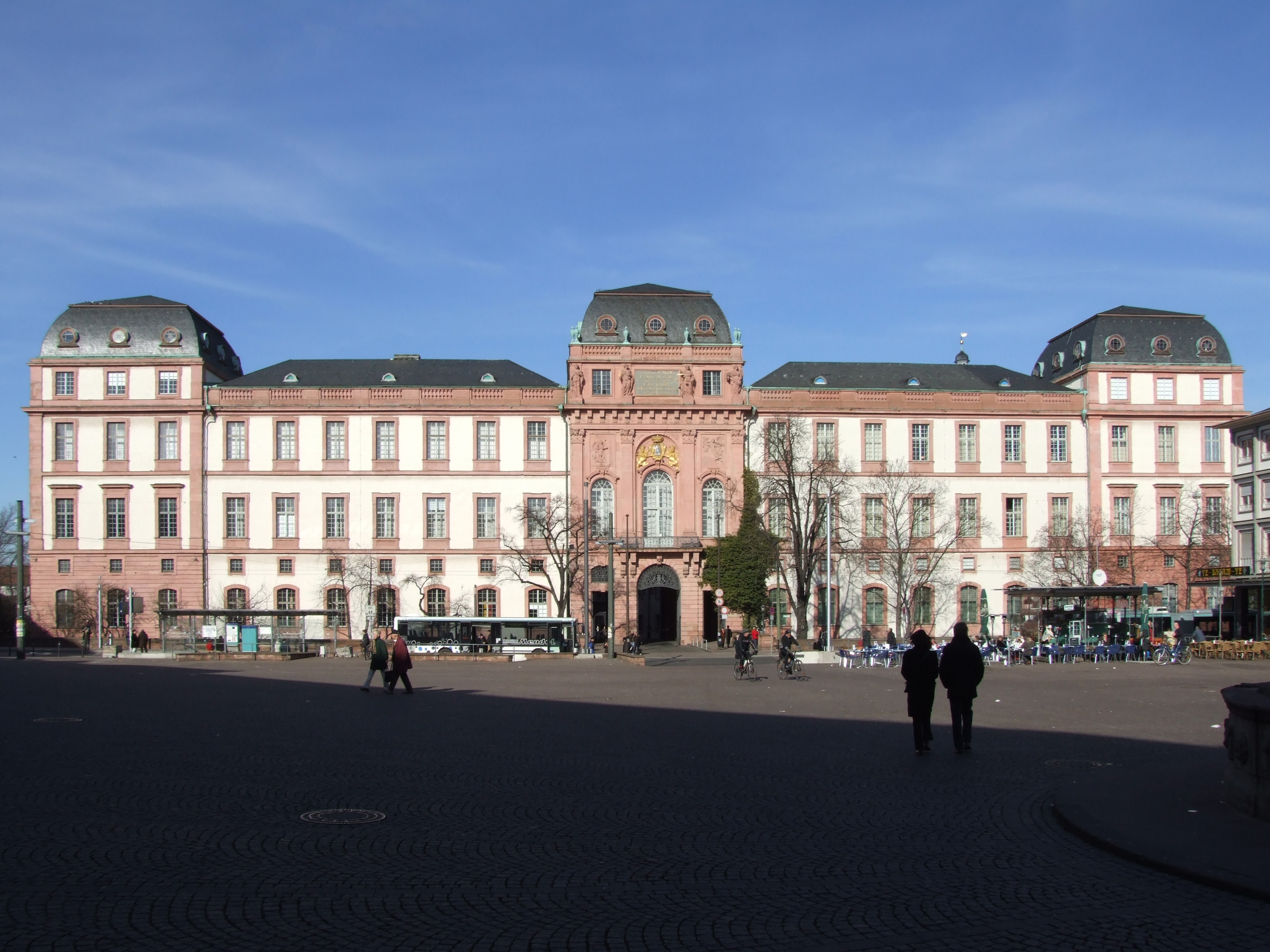 Schloss Darmstadt Ansicht vom Marktplatz